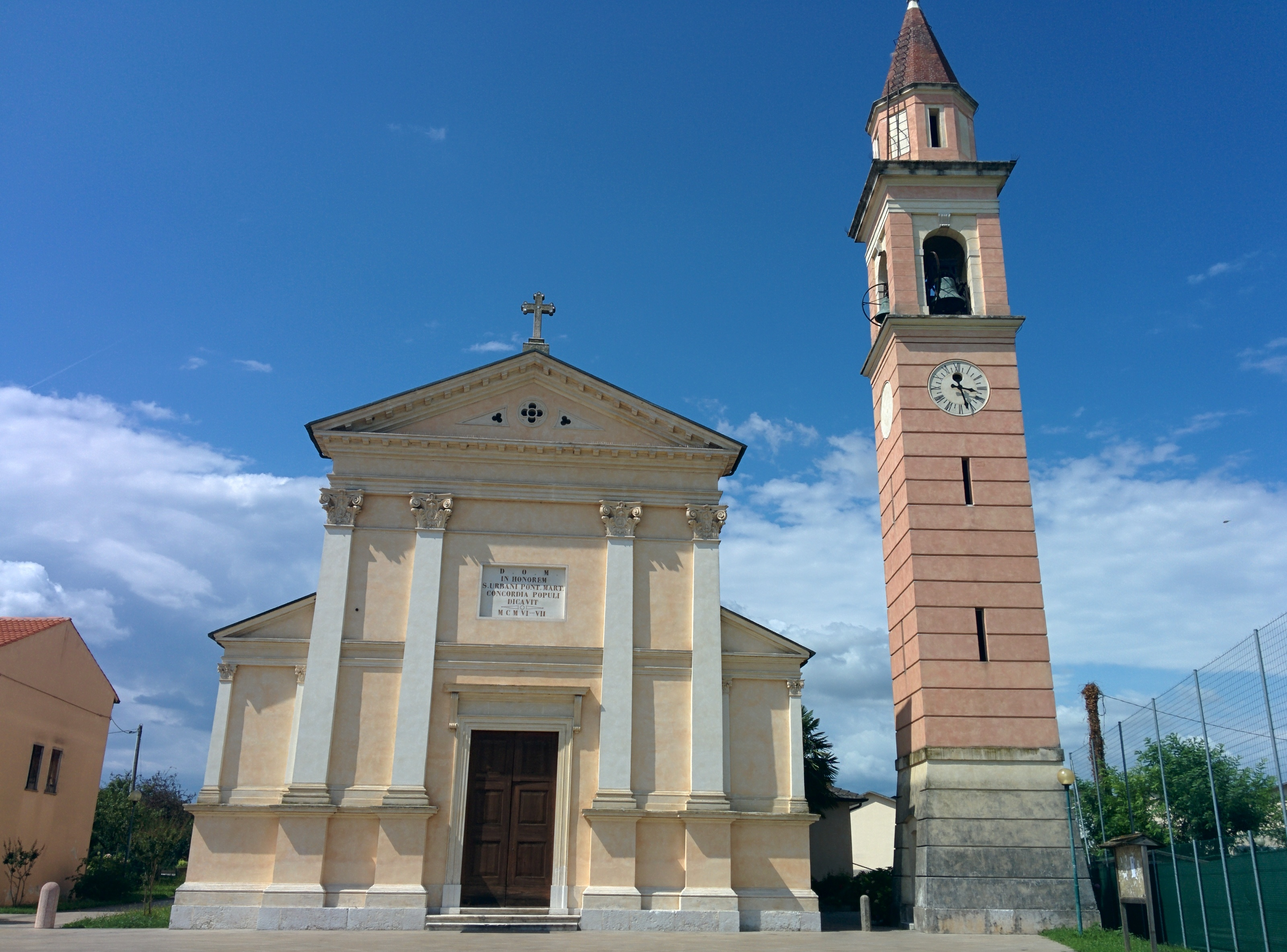 Chiesa parrocchiale di Cresole, frazione di Caldogno in provincia di Vicenza